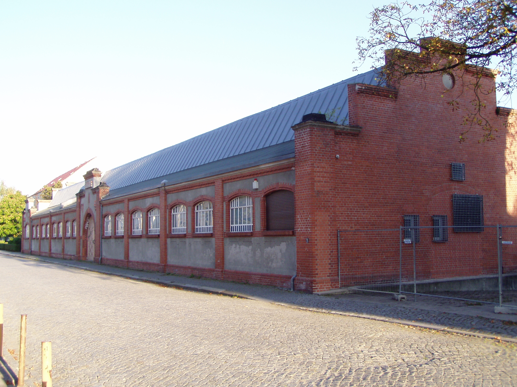 Die "Lederhalle", erbaut zur Lagerung des in Kirchhain hergestellten Leders, war sie danach ein Einkaufsmarkt.